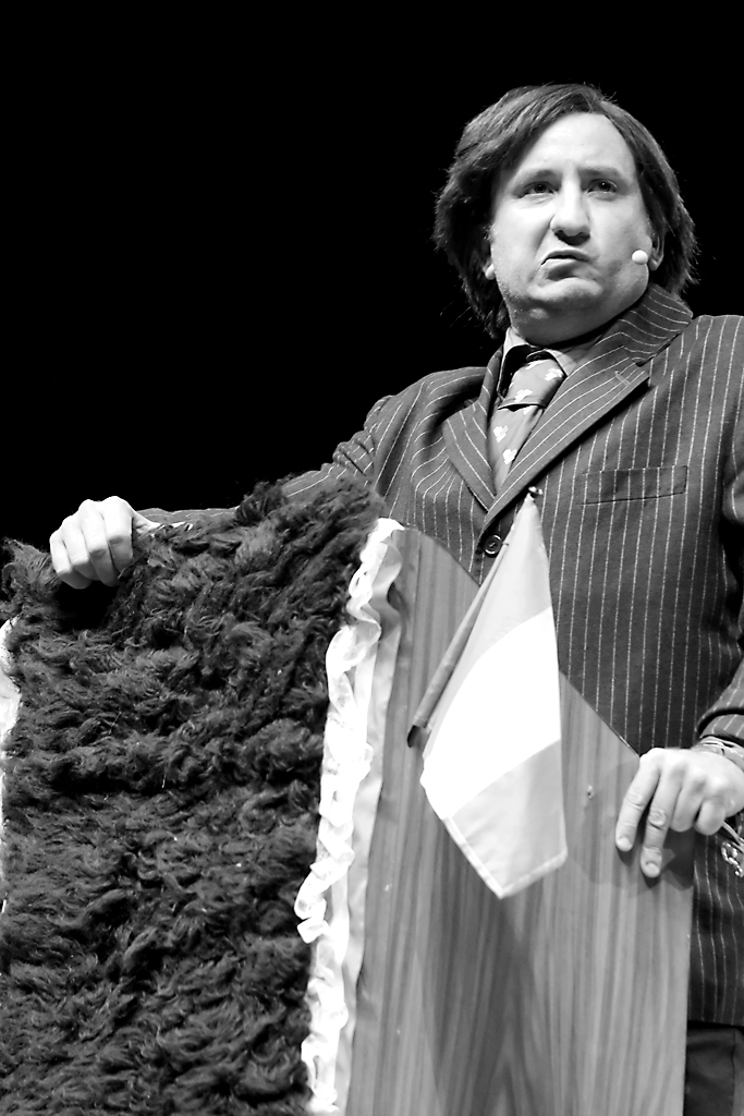 Cetto La Qualunque (Antonio Albanese) - 11 Settembre 2010, 9° Incontro nazionale di Emergency, Firenze